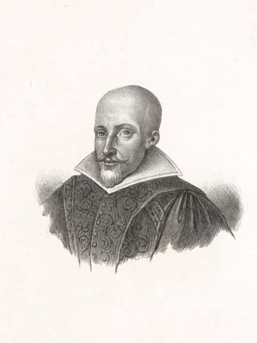 Dal Dizionario biografico degli uomini illustri di Sardegna di Pasquale Tola, 1837